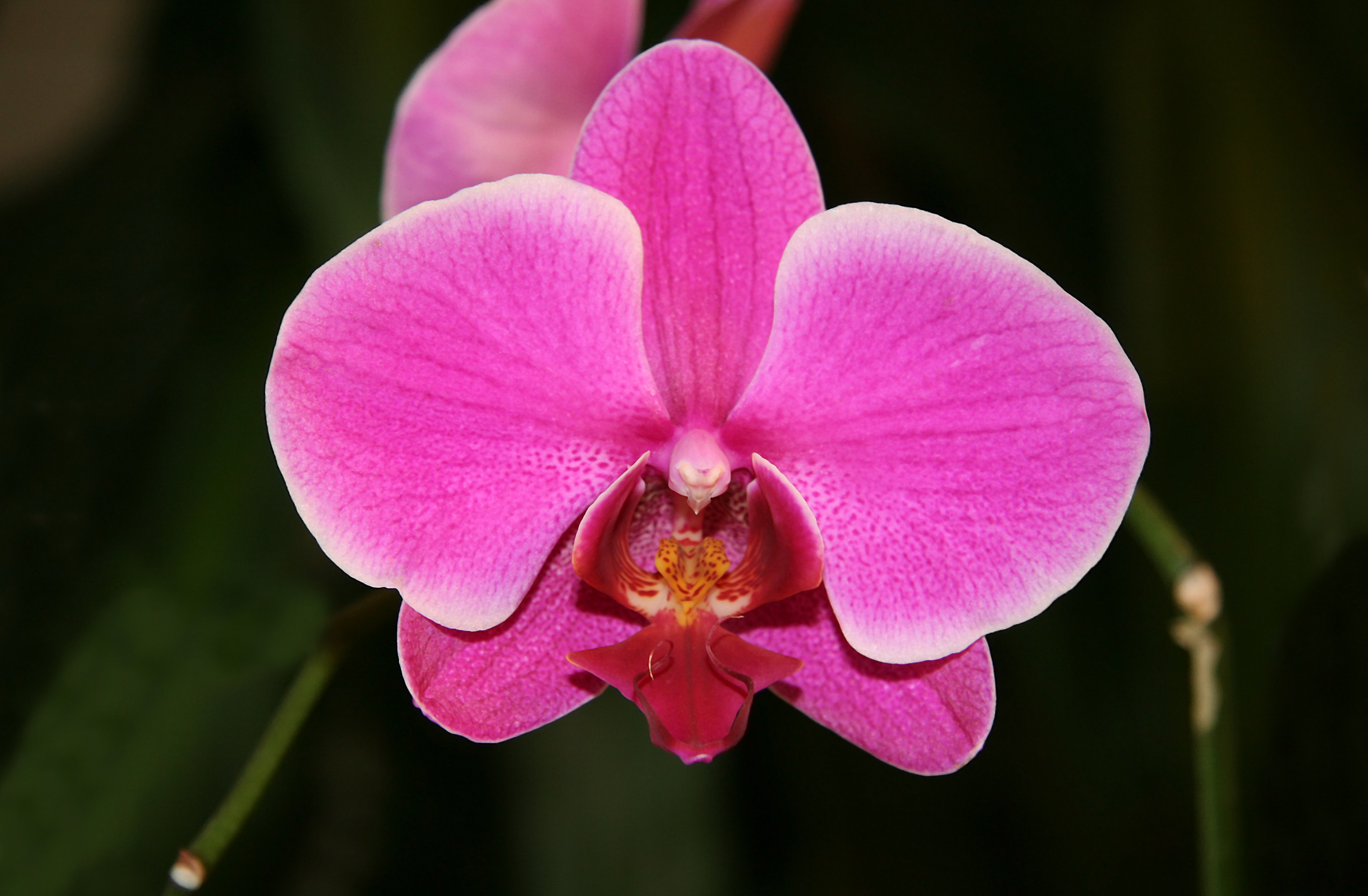 Phalaenopsis hybrid